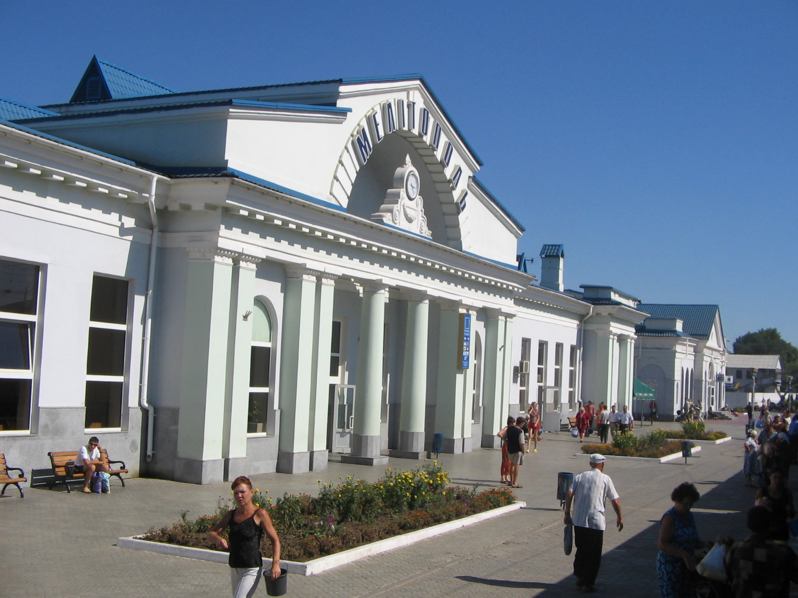 Вокзал города Мелитополь